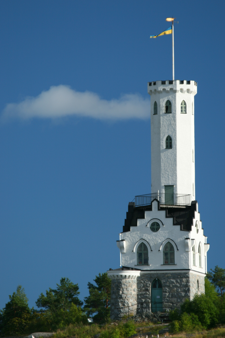 Söderhamns utkikstorn Oscarsborg.